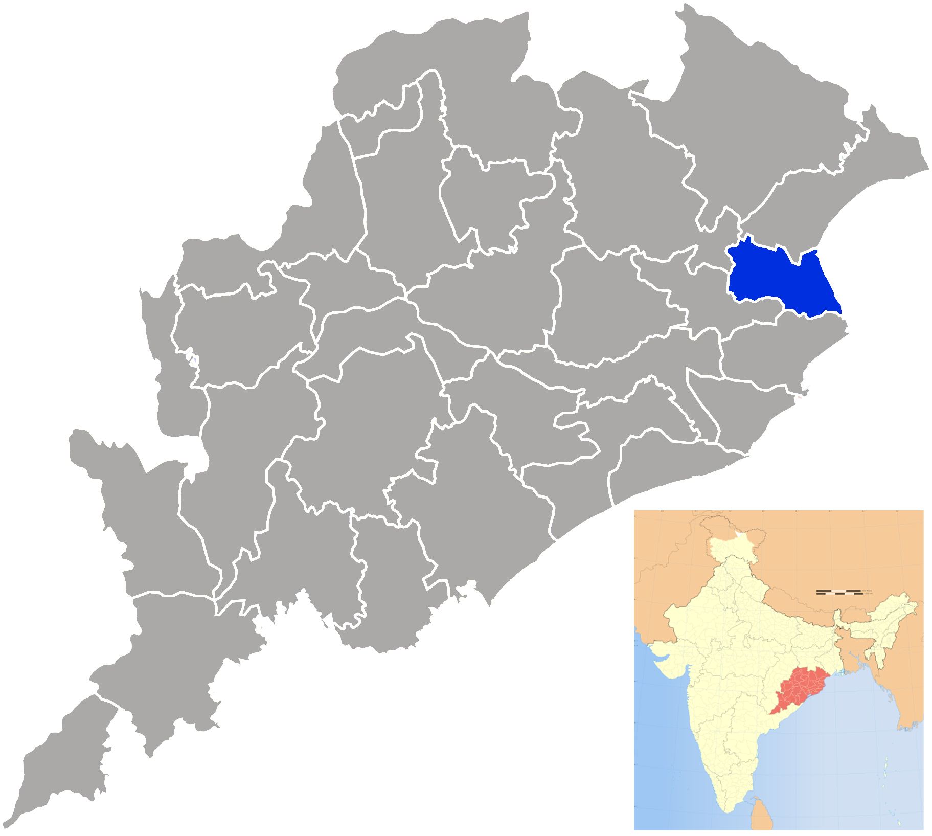 Bhadrak district in Orissa